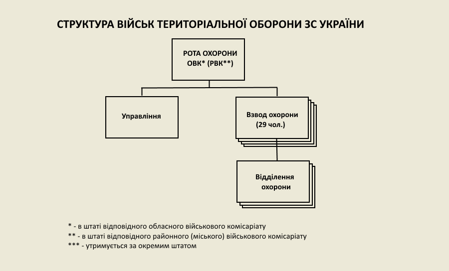 Схема, Структура роти охорони військового комісаріату територіальної оборони